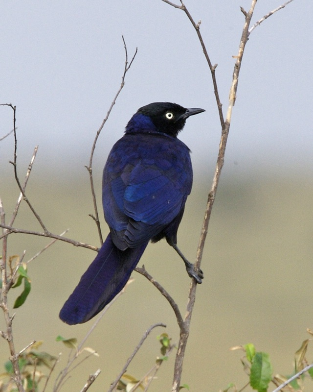 Rüppell's Glossy Starling Lamprotornis purpuroptera, Masai Mara, Kenya